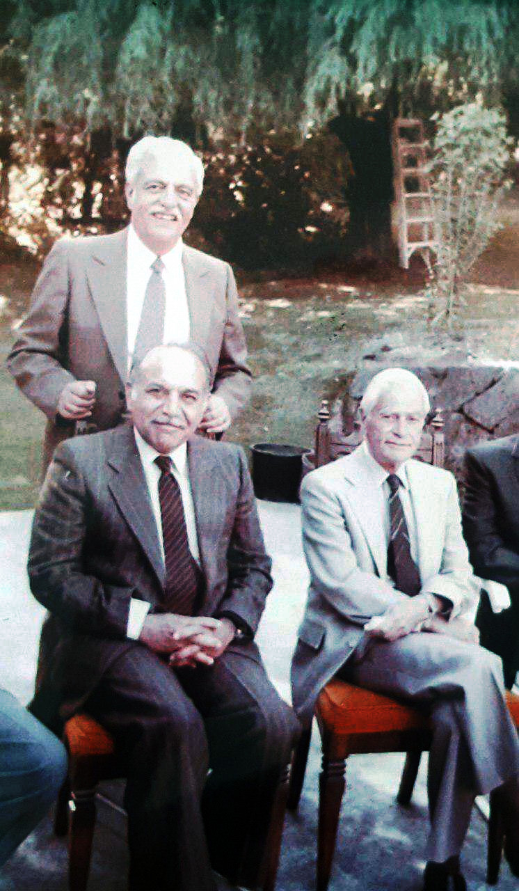 دکتر موحد- مهندس زيرک زاده از رهبران حزب ايران